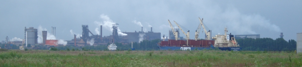 Sidmar aka Arcelor-Mittal